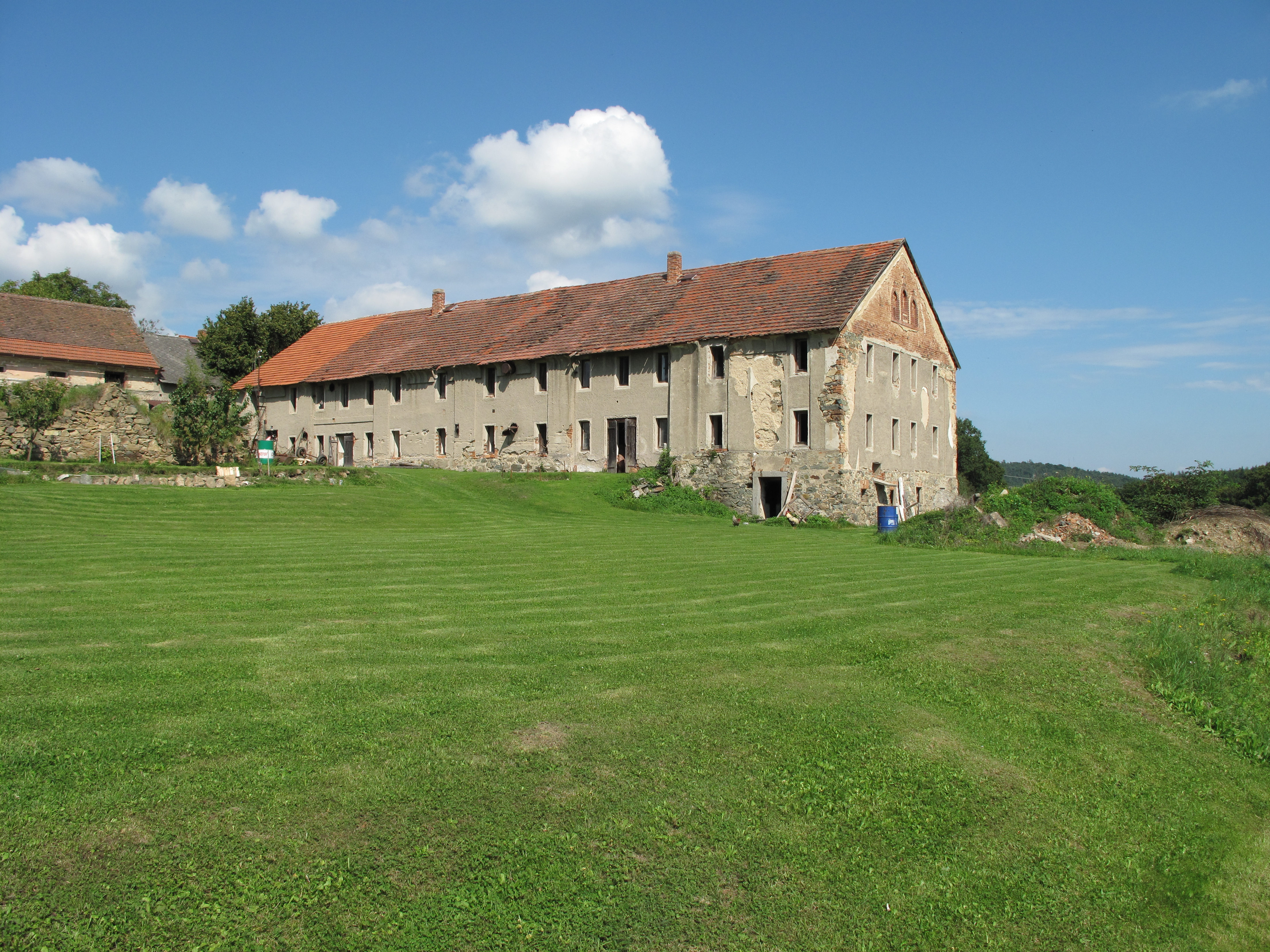 Statek v Rabyni. Okres Benešov, Česká republika.